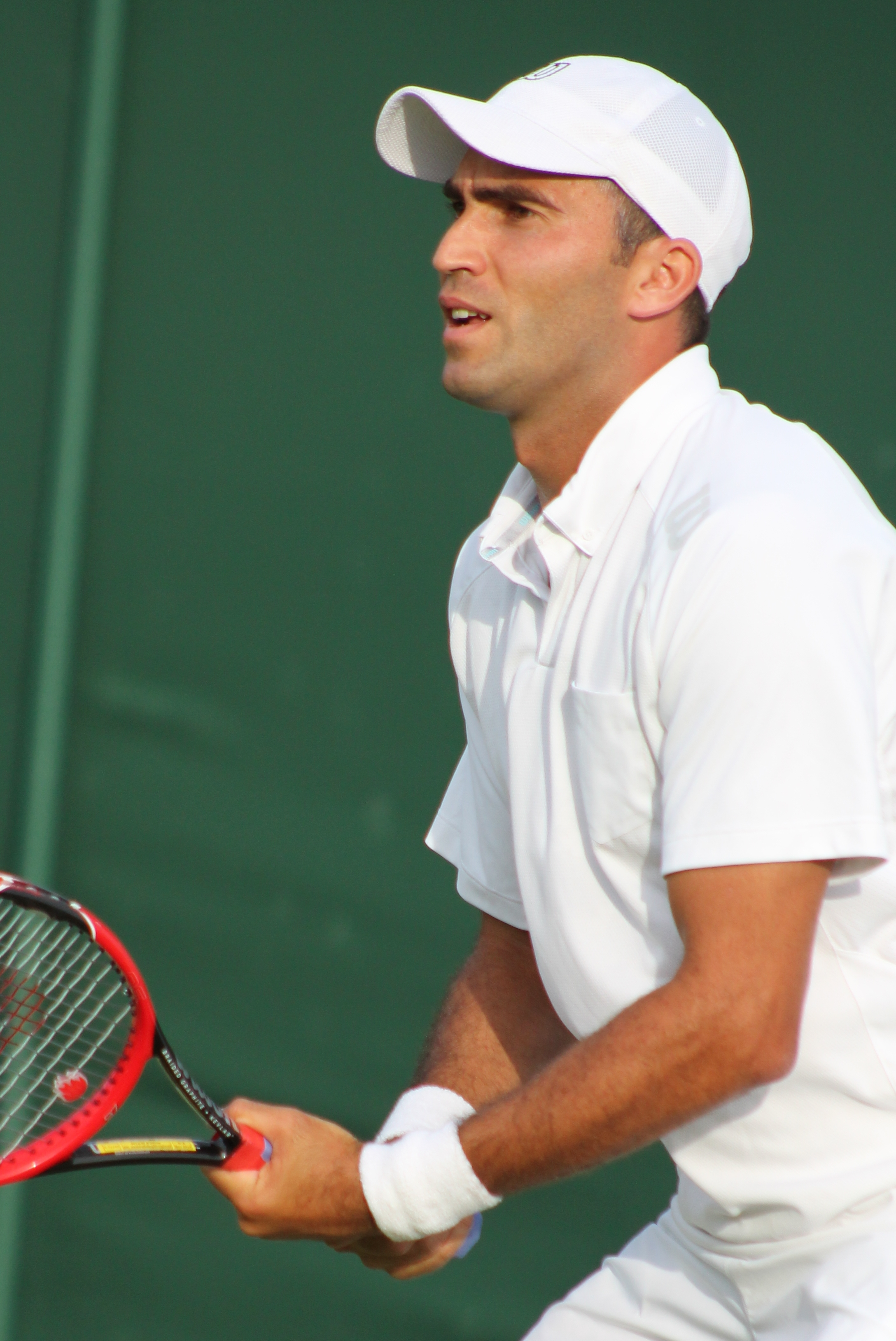 Tecau WM15 (1)